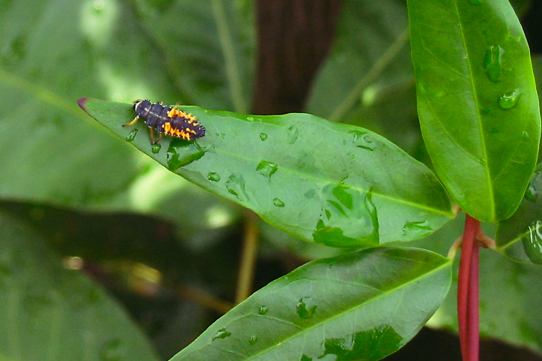 Harmonia axyridis larva (instar 4)ladybugs are overrated